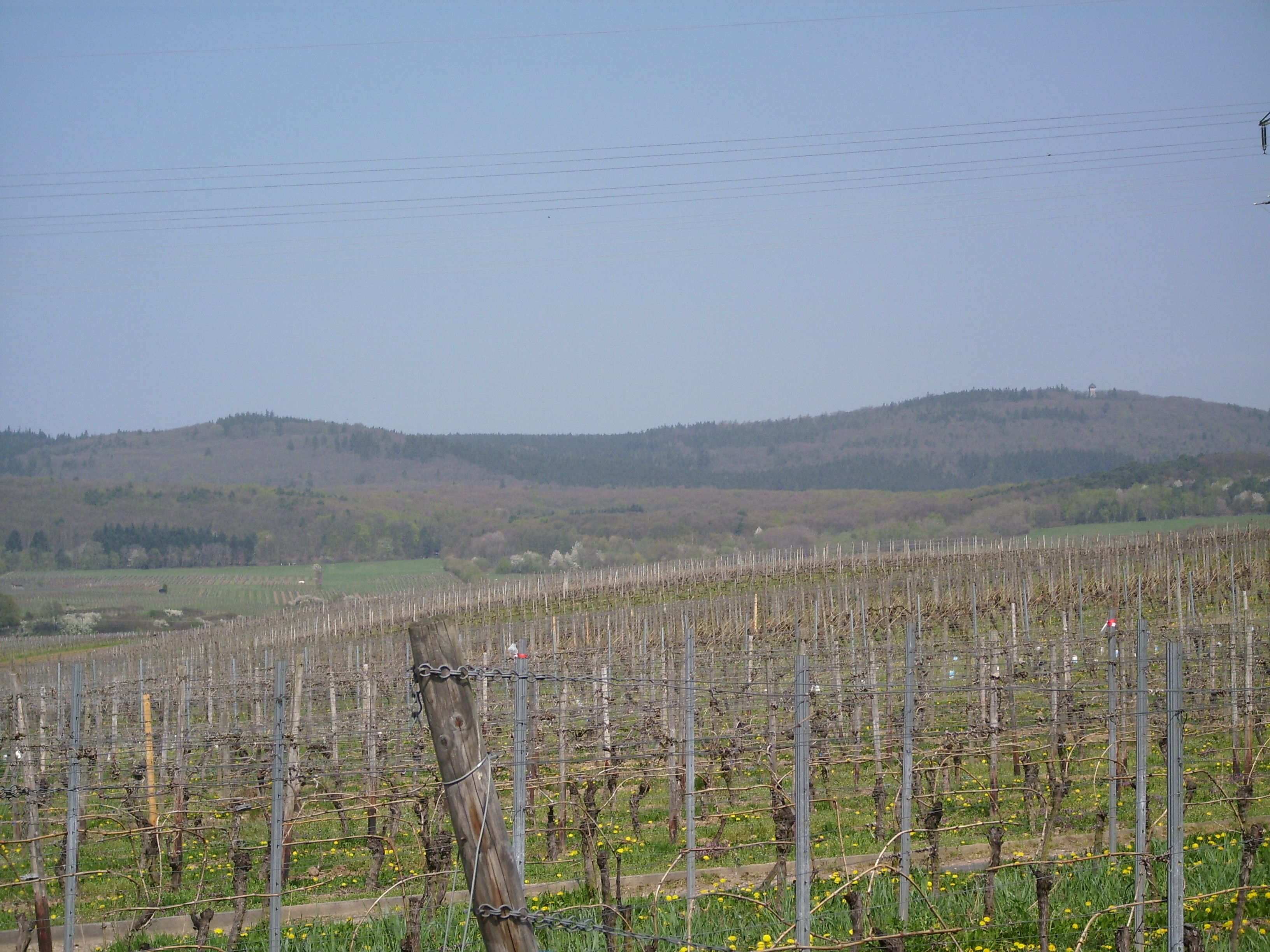 Weinberge in Oestrich mit Blick auf die Hallgartener Zange.